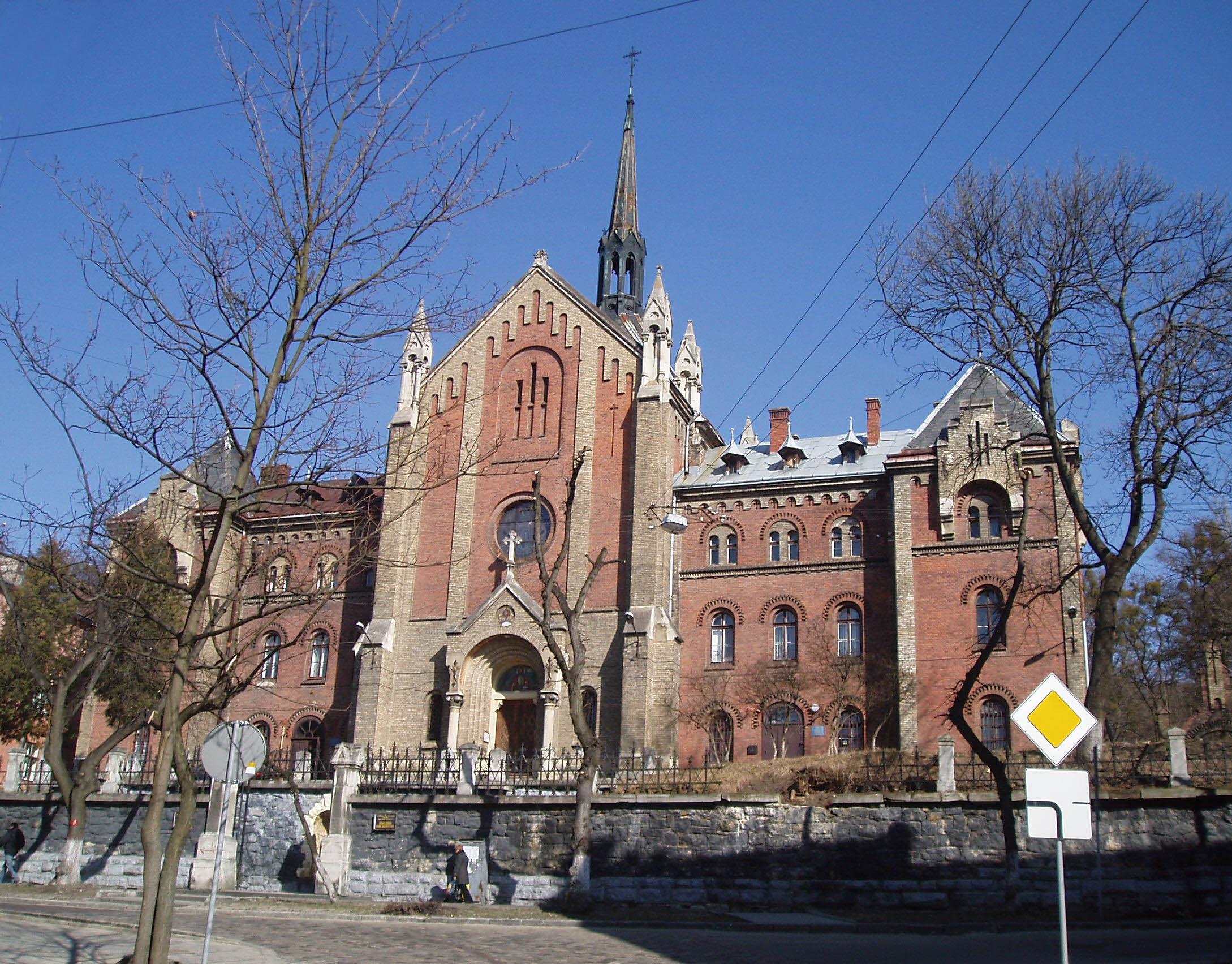 Храм Святого Іоана Золотустого (дослівно списано з таблички) і духовна семінарія, колишній Костел Найсвятішого Серця Ісусового і монастир францисканок